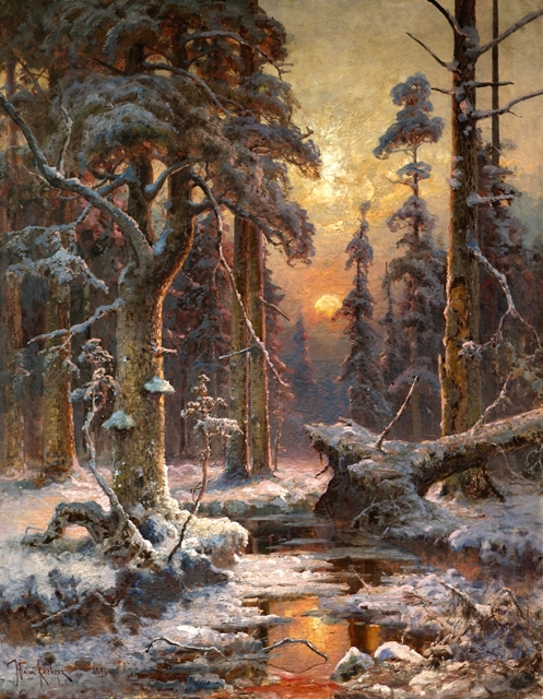 Зимний закат в еловом лесу - Julius von Klever (1896) Julius Sergius von Klever, Winterliches Waldinneres bei Sonnenuntergang, 1896, oil on canvas 175 x 138 cm